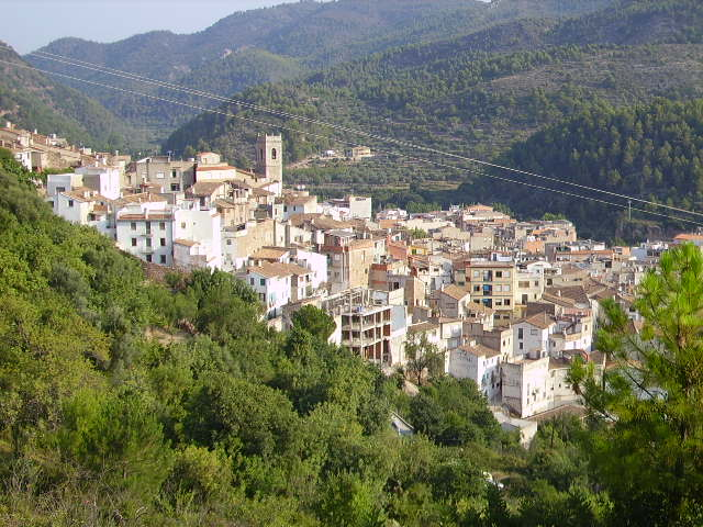 View of Eslida village.